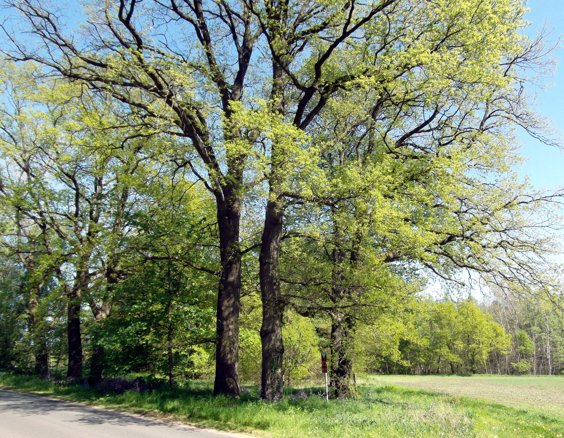 Am Rand des Naturschutzgebiets Brandmoorwiesen